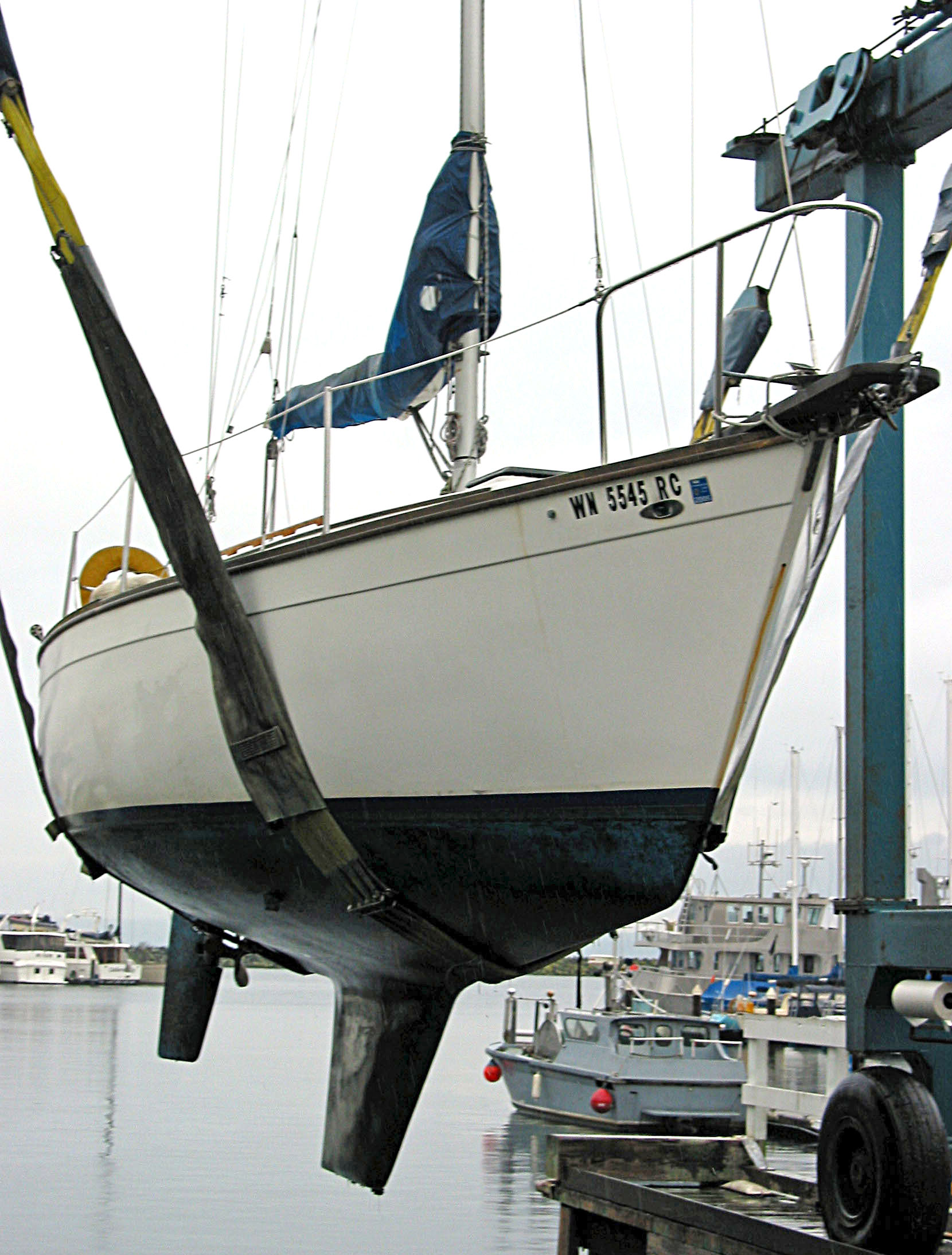 Mariah Quarter View